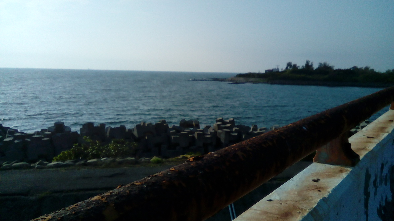 同上